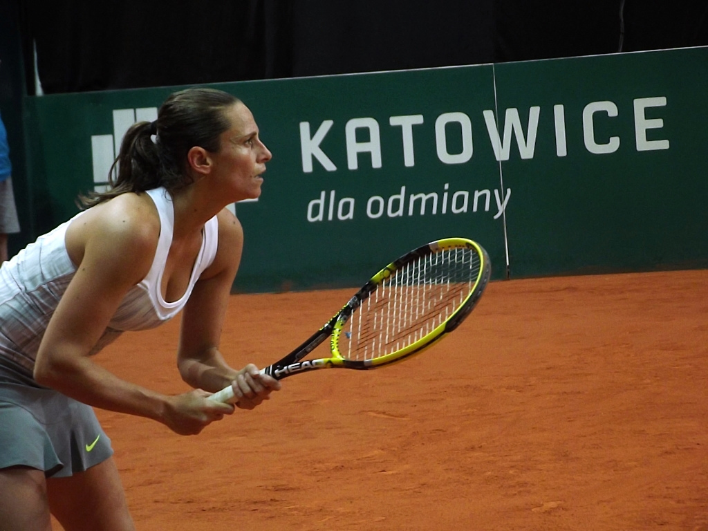 Zdjęcie zrobione podczas kobiecego turnieju tenisowego BNP Paribas Katowice Open, w katowickim Spodku.